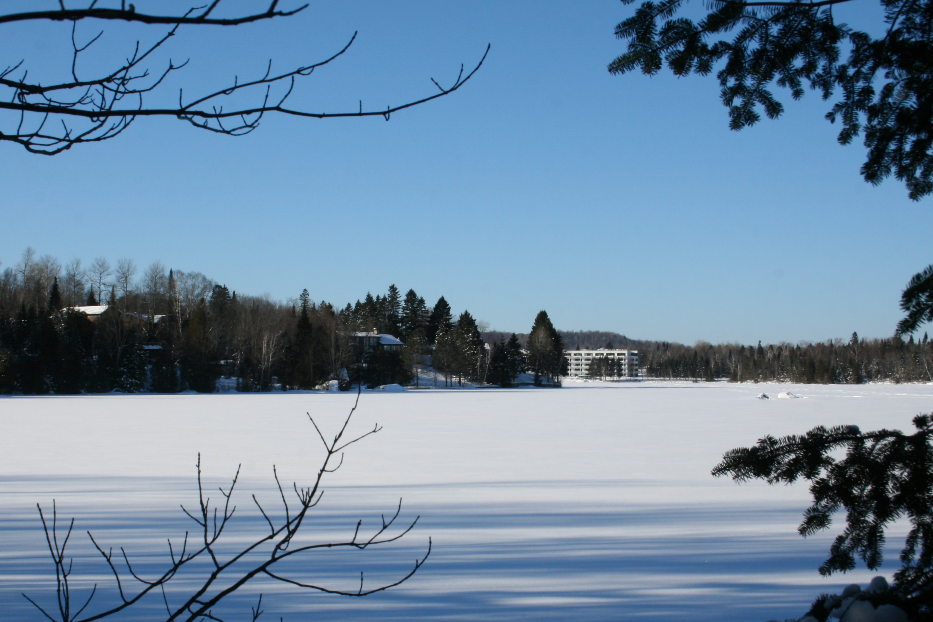 Estérel, Quebec, Canada